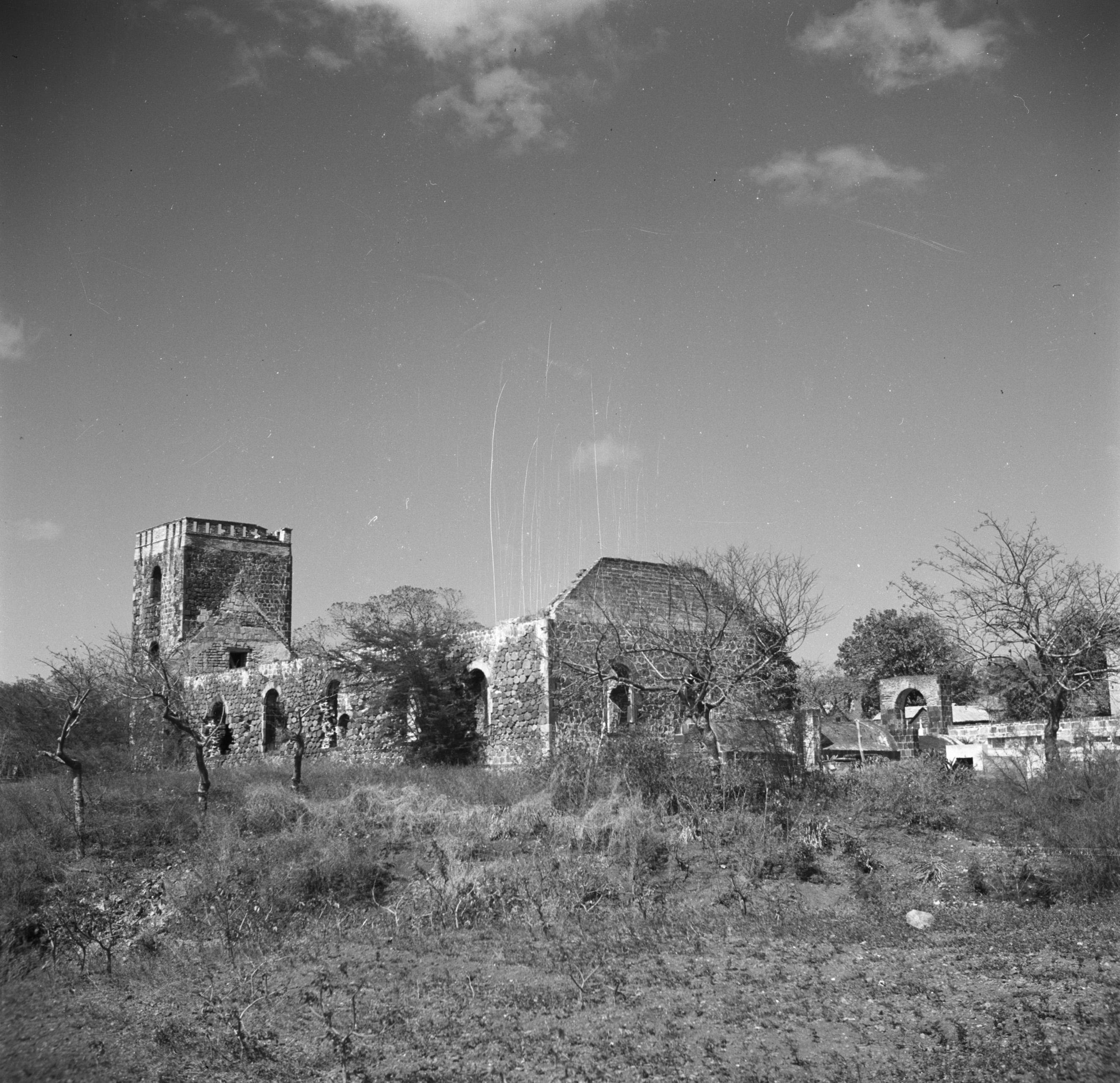 Collectie / Archief : Fotocollectie Van de Poll Reportage / Serie : Reis naar Suriname en de Nederlandse Antillen Beschrijving : De ruïne van de Hervormde Kerk in Oranjestad op Sint-Eustatius Datum : 1947 Locatie : Nederlandse Antillen, Sint-Eustatius Trefwoorden : kerken, ruïnes Fotograaf : Poll, Willem van de, [onbekend] Auteursrechthebbende : Nationaal Archief Materiaalsoort : Negatief (zwart/wit) Nummer archiefinventaris : bekijk toegang 2.24.14.02 Bestanddeelnummer : 252-8296